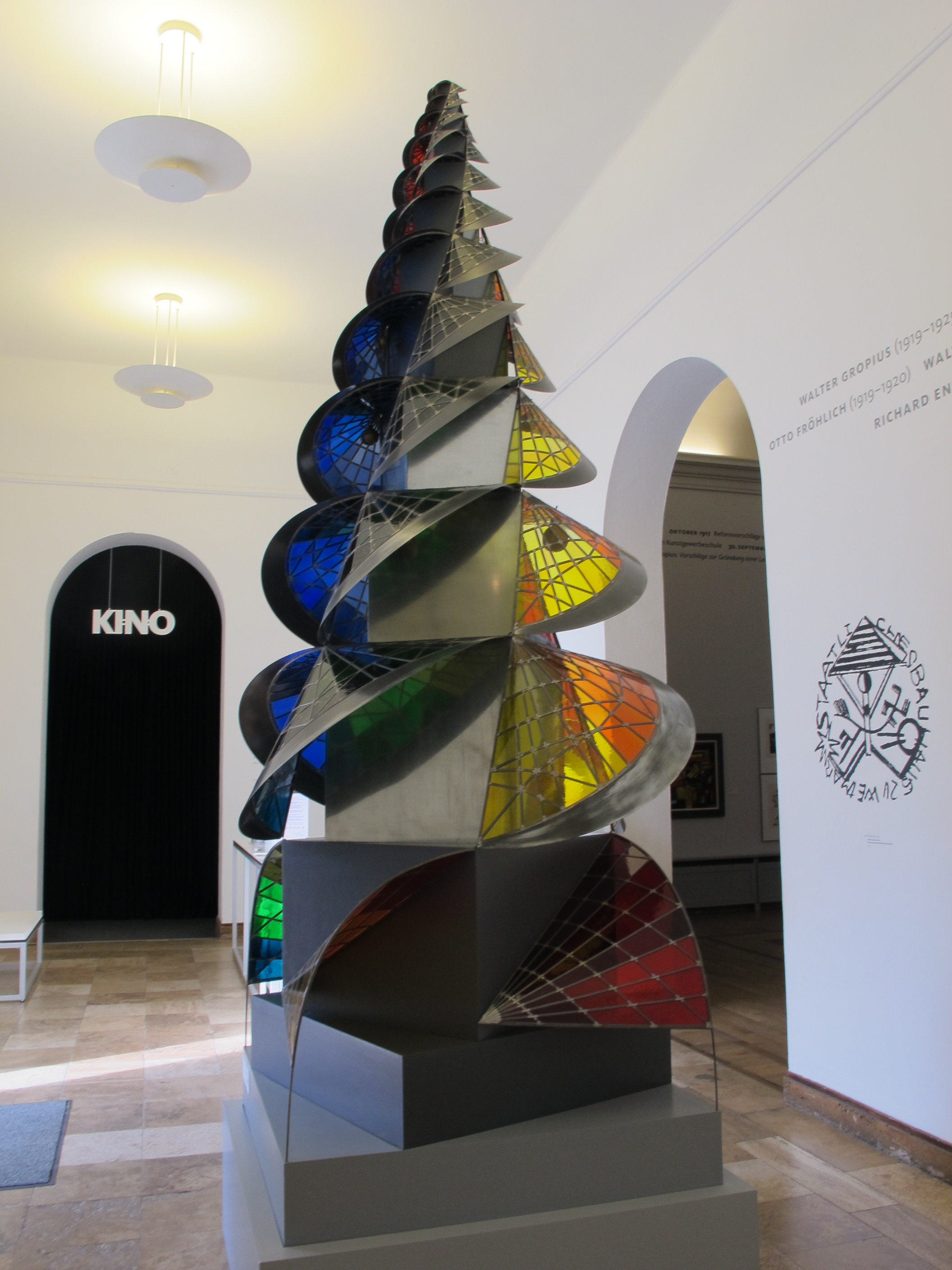 Bauhaus Museum Weimar